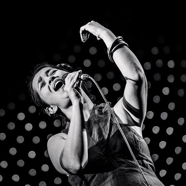 Céline Rudolph at Jarasum Jazz Festival 2015.